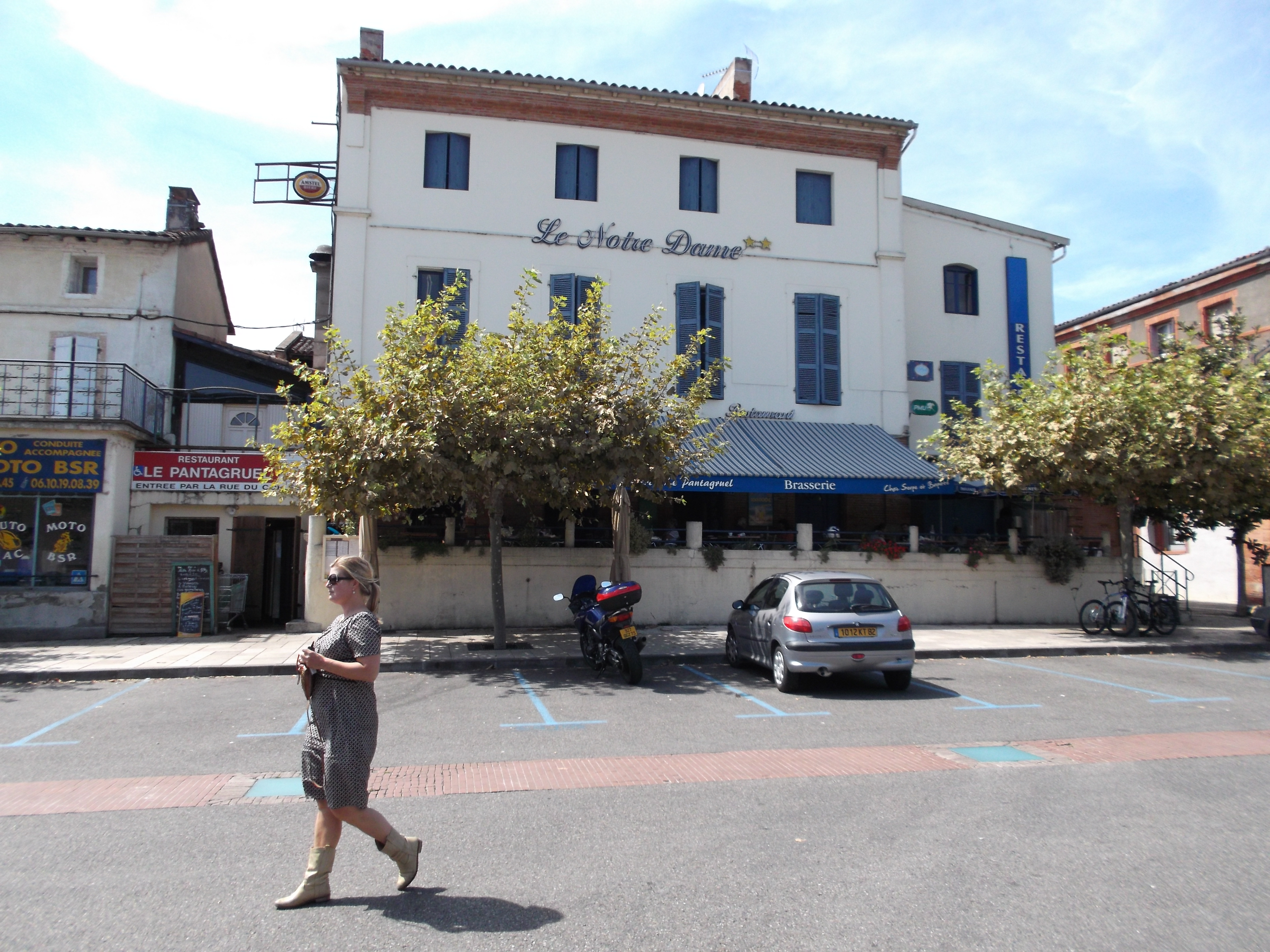 Marktplein van Montech, Frankrijk